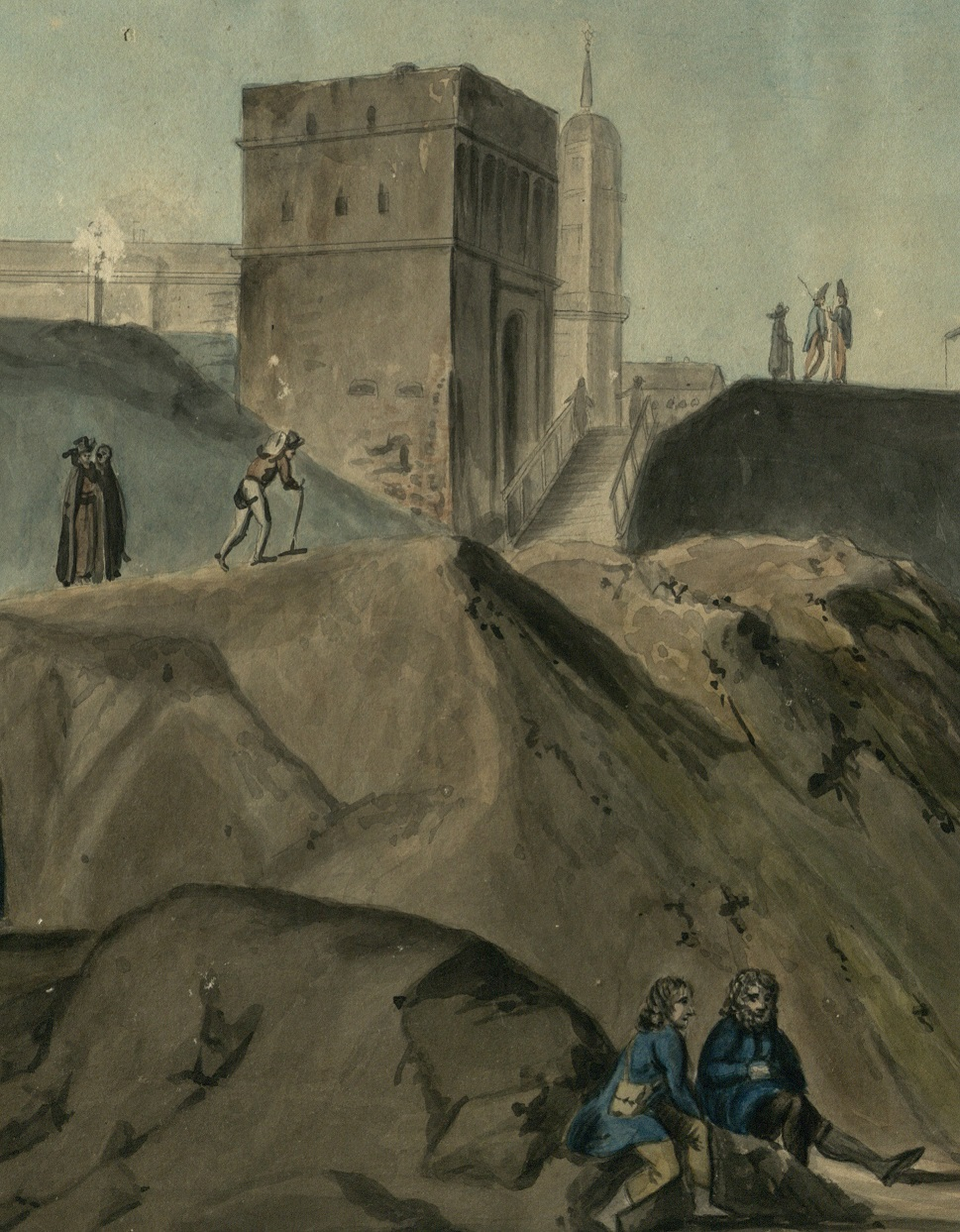 Беларуская (тарашкевіца): Магілёў (Mahiloŭ), Алейная брама (Alejnaja brama). Акварэль Юзэфа Пешкі (Juzef Pieška)